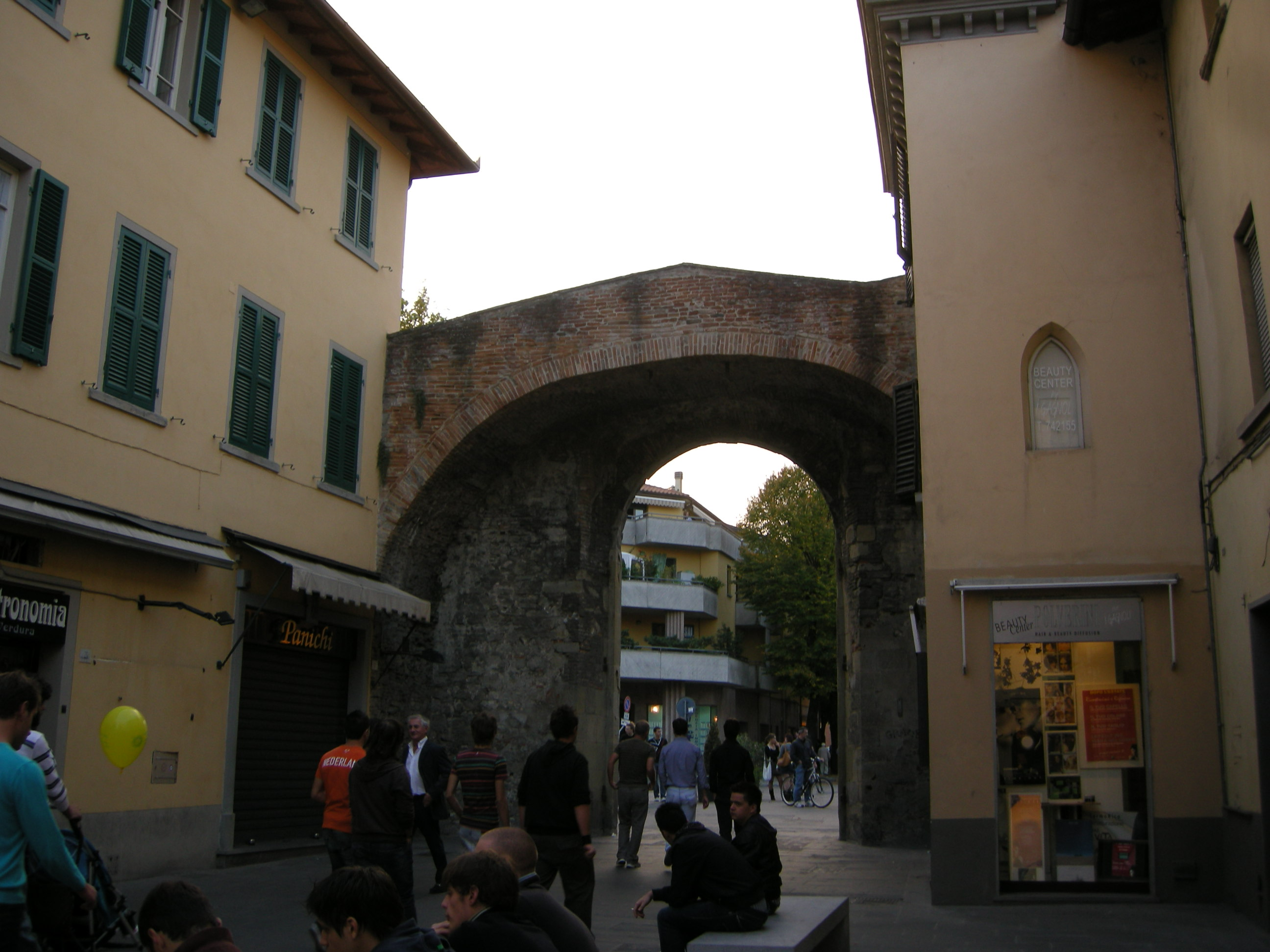 Sansepolcro, porta fiorentina